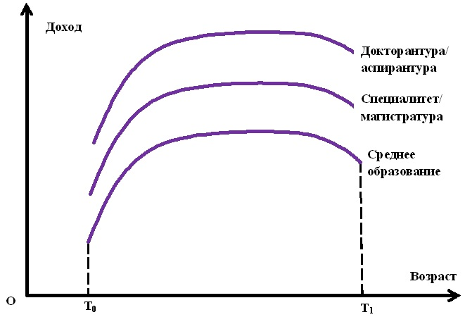 Профиль доход-возраст-образование (Рощина Я.М. Основы моделирования экономического поведения домохозяйств, М.:ВШЭ, 2015 - стр 99